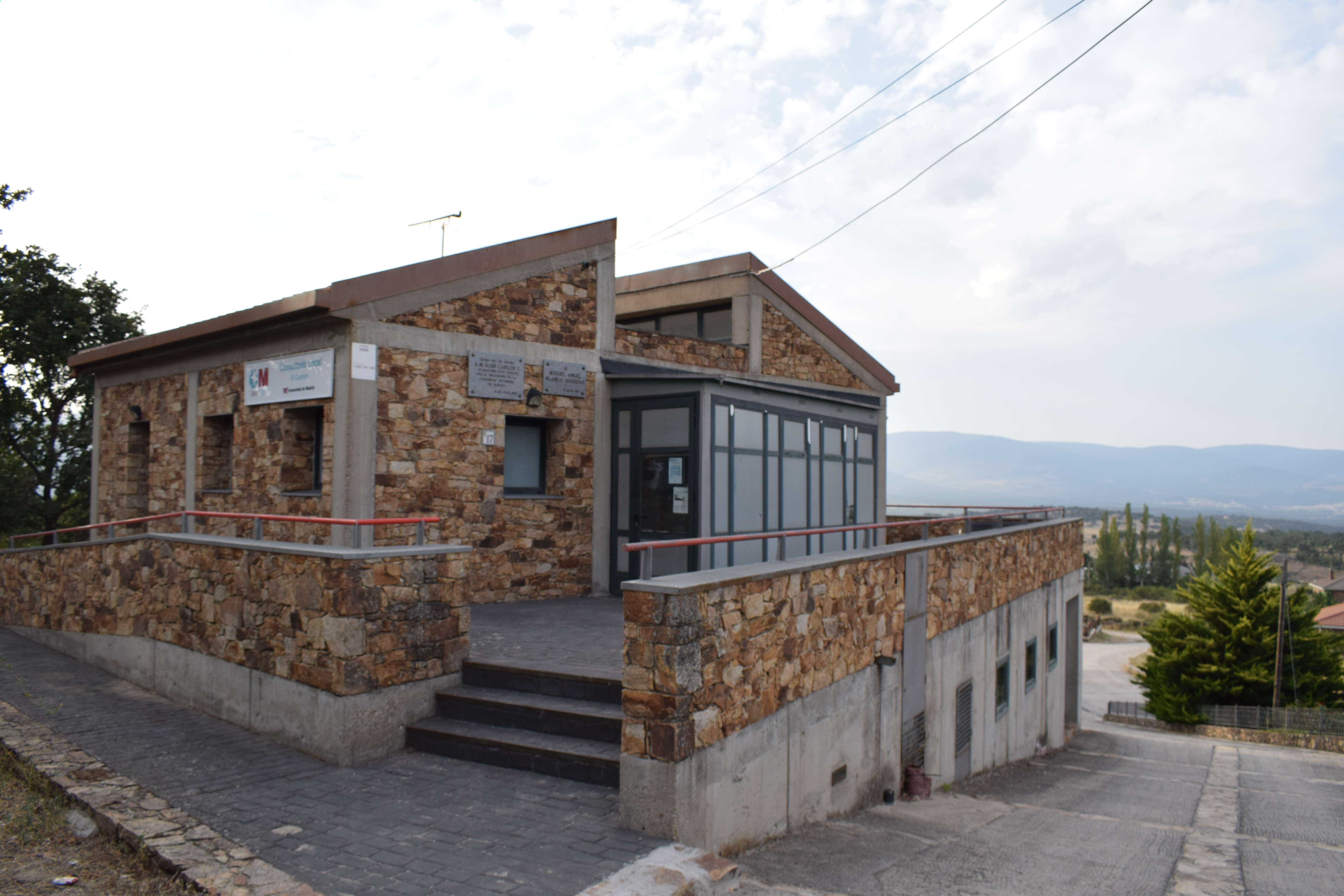 Clinica de El Cuadron (Madrid)